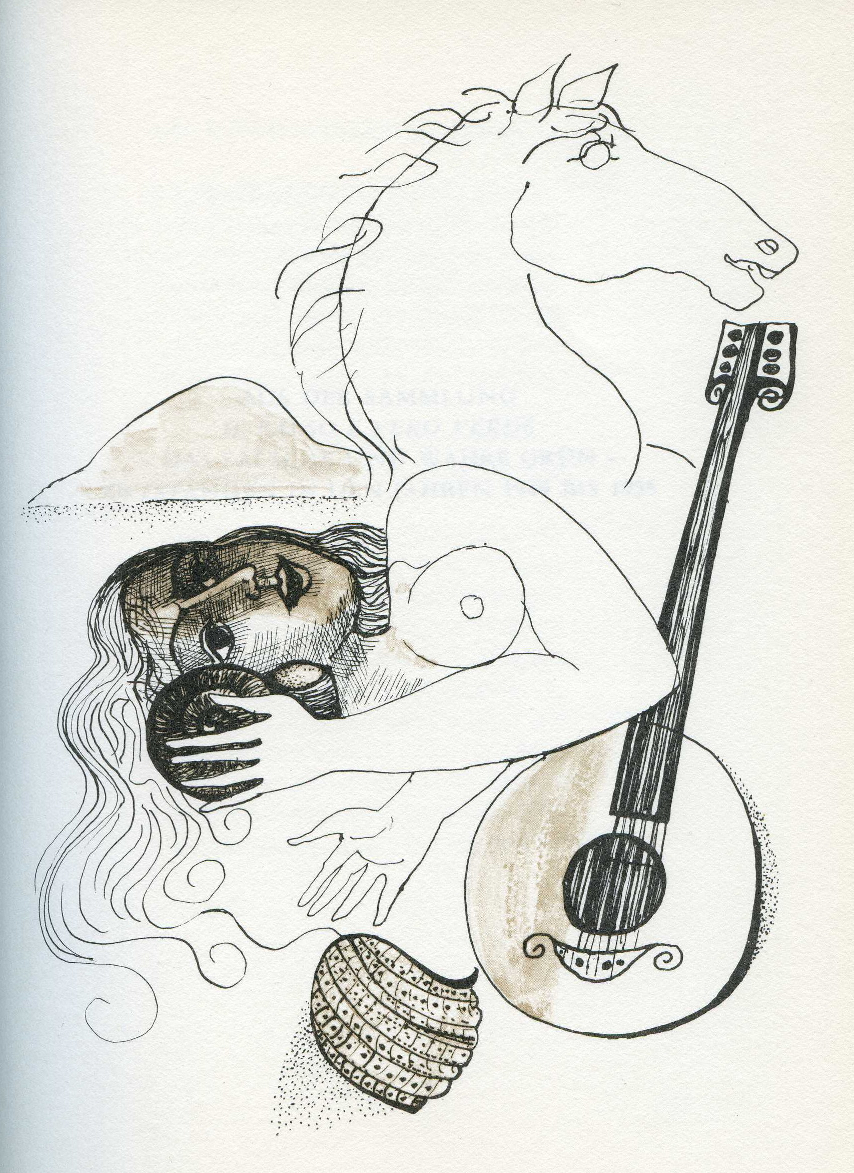 Elfriede Weidenhaus, Illustration zu Savatore Quasimodo, Gesammelte Gedichte